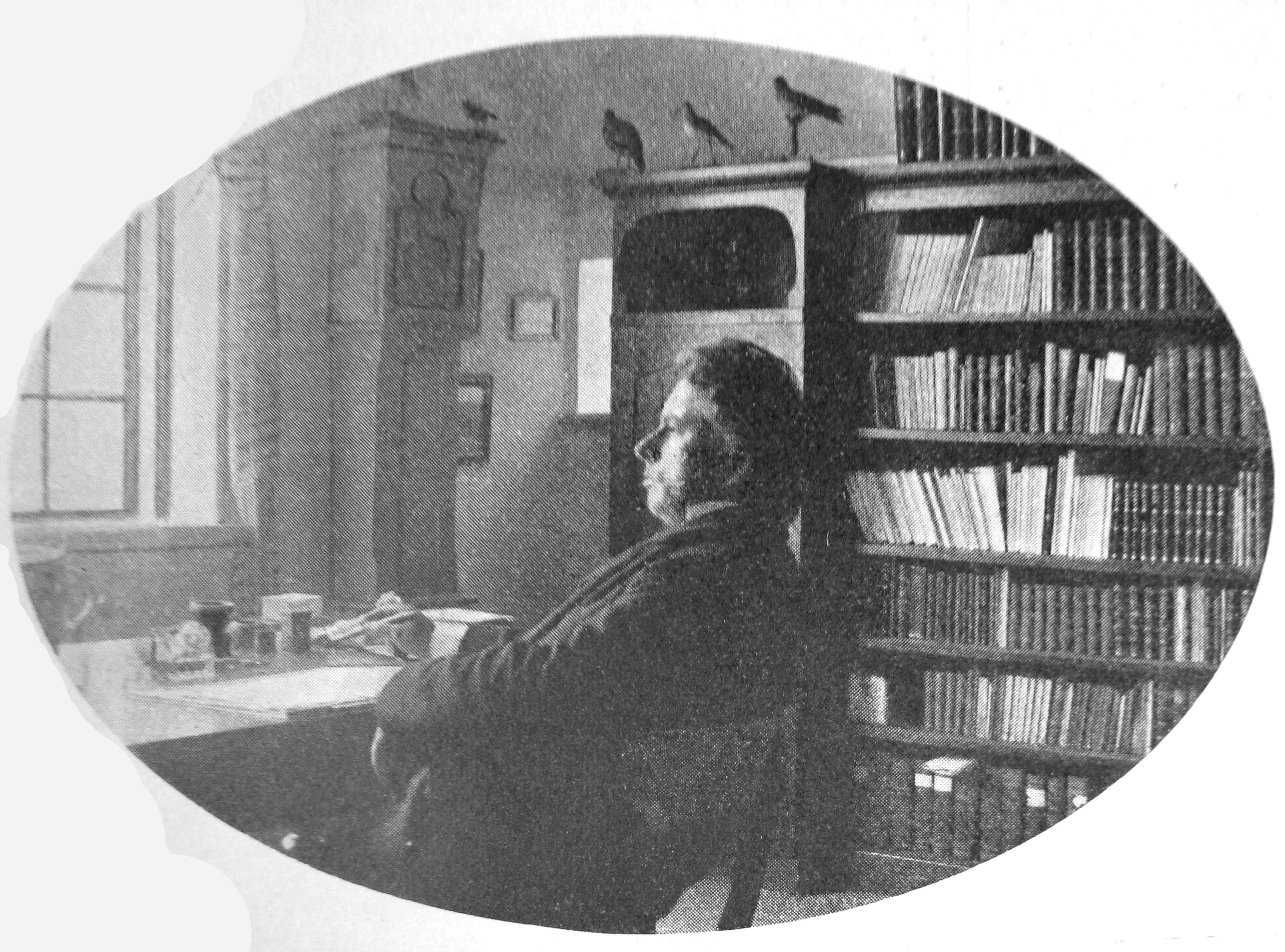 Jeppe Aakjær på Jenle